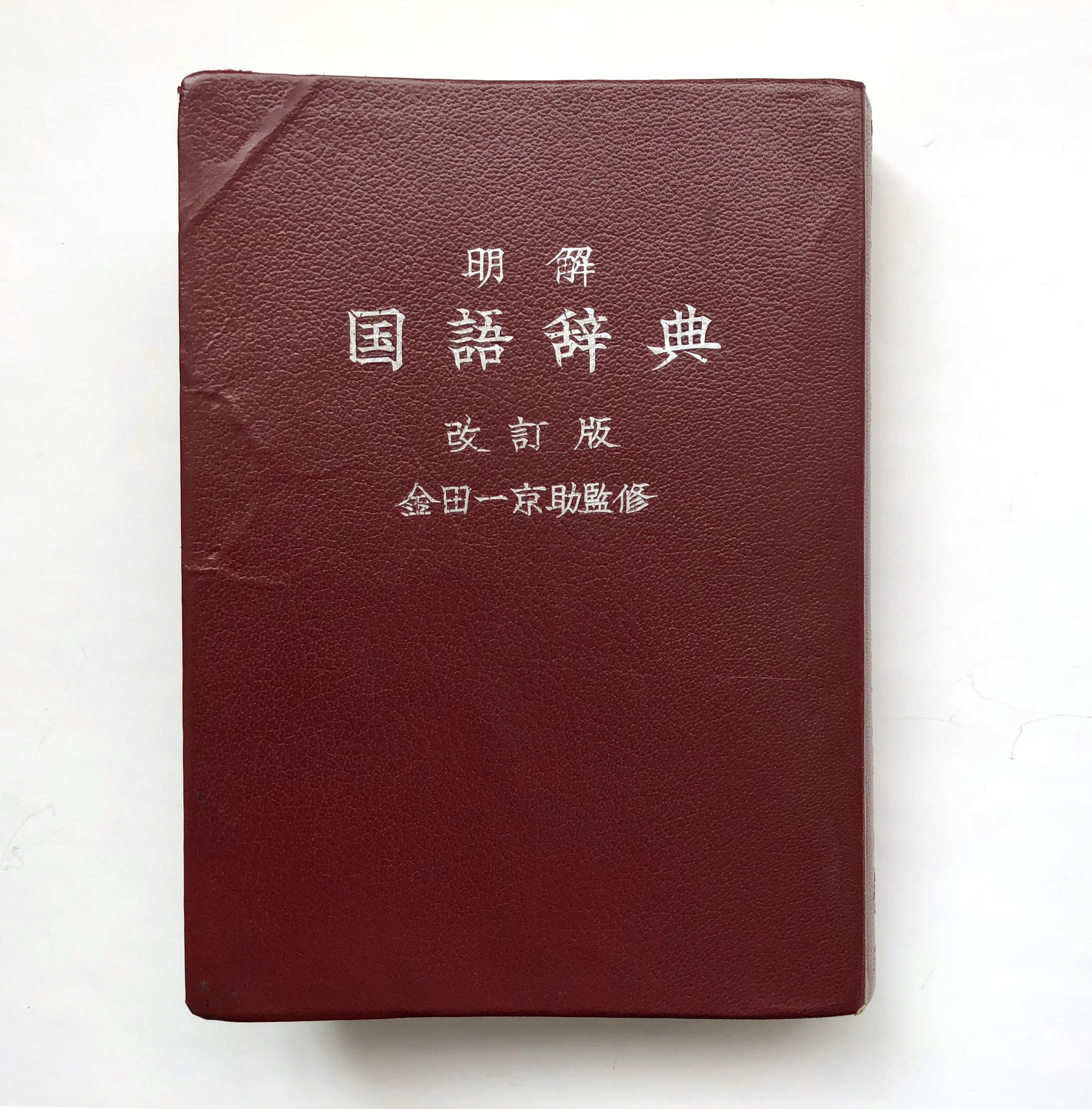 明解国語辞典・改訂版(三省堂書店)の表紙